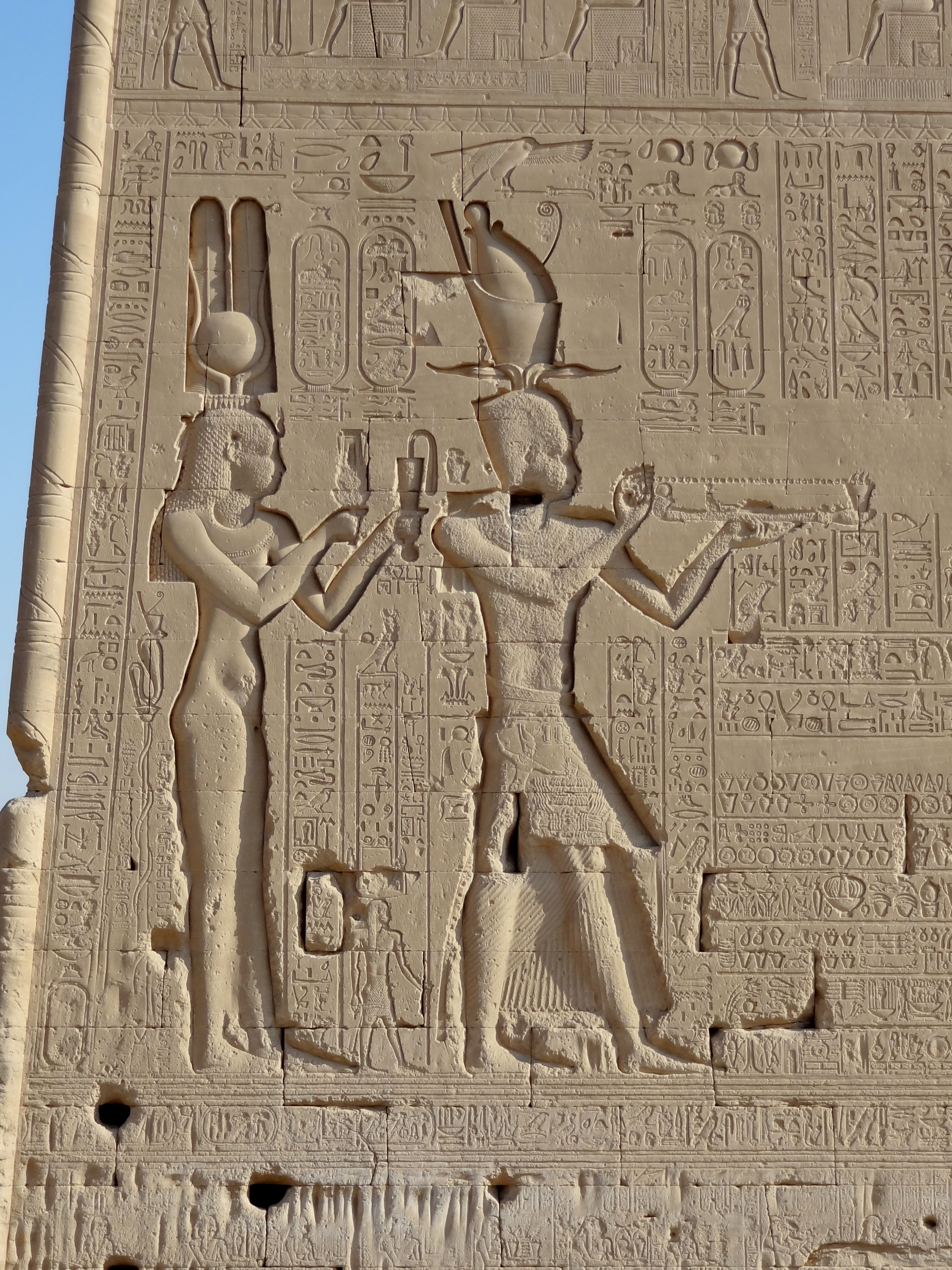 Relief mit Kleopatra VII. und ihrem Sohn Cäsarion an der Südseite des Hathor-Tempels von Dendera, Ägypten